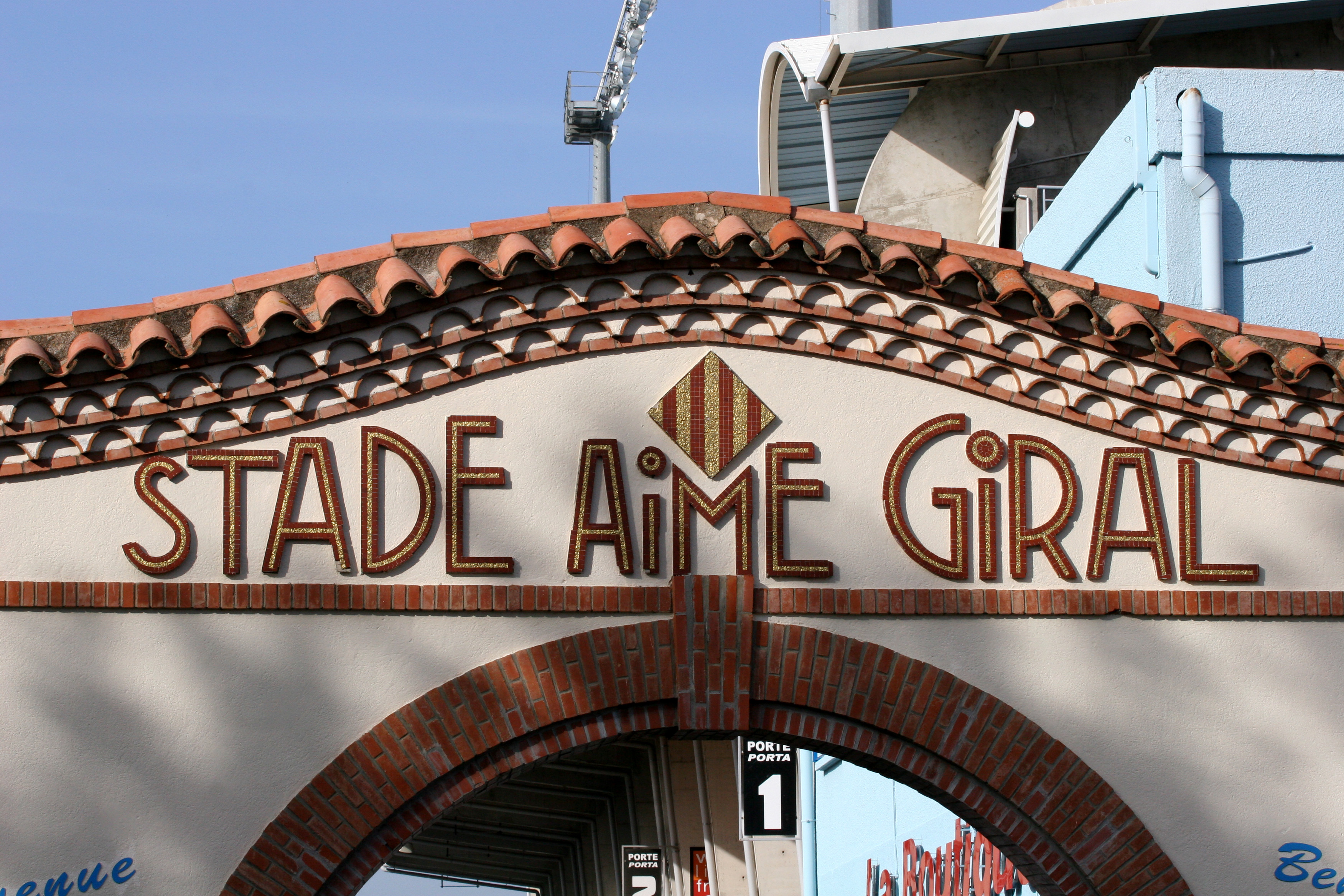 Stade Aimé Giral à Perpignan - Languedoc-Roussillon - 66 Pyrénées-Orientales - France et Catalogne